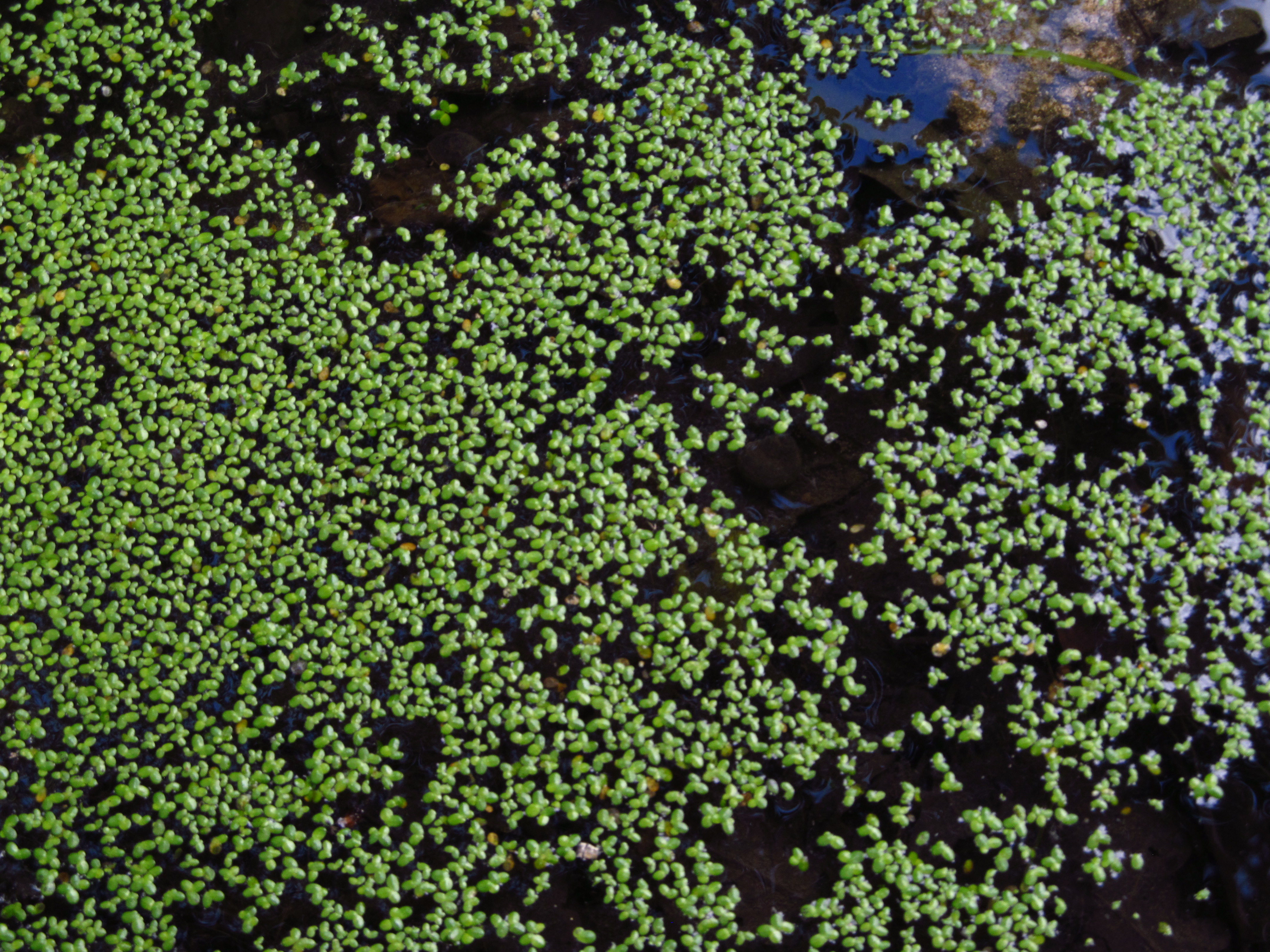 Srpski (latinica): sočivica (Lemna)